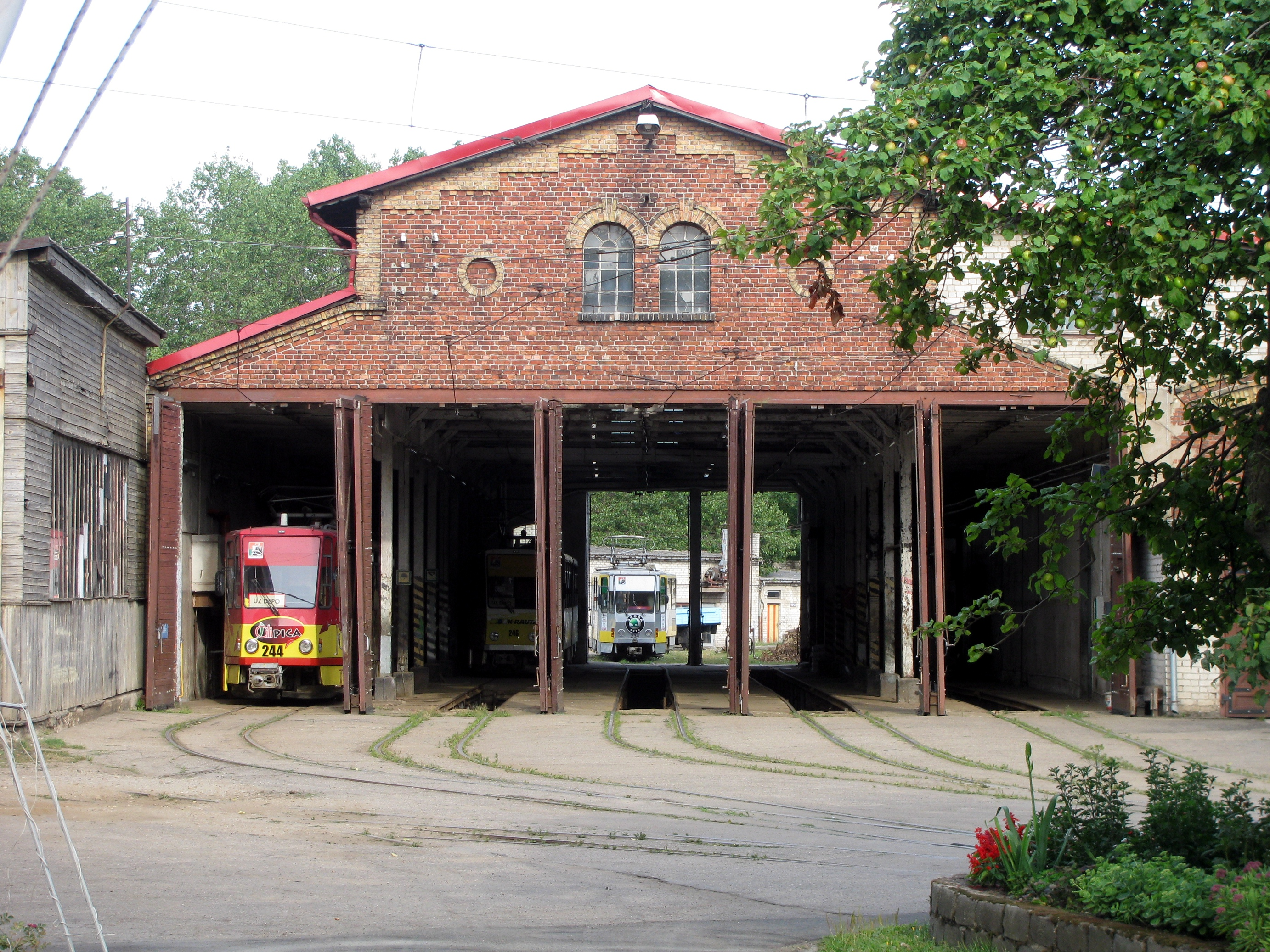 Hala vozovny tramvají v Liepāji, Rīgas iela 54a .